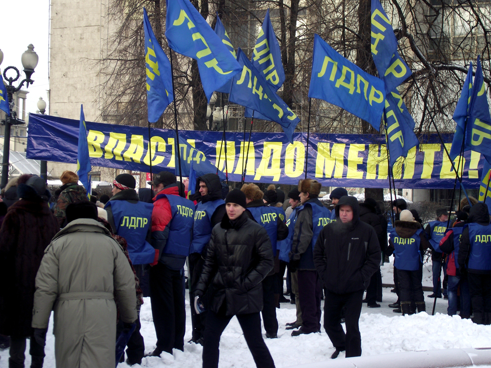 Митинг ЛДПР на Пушкинской площади 4 февраля 2012 года